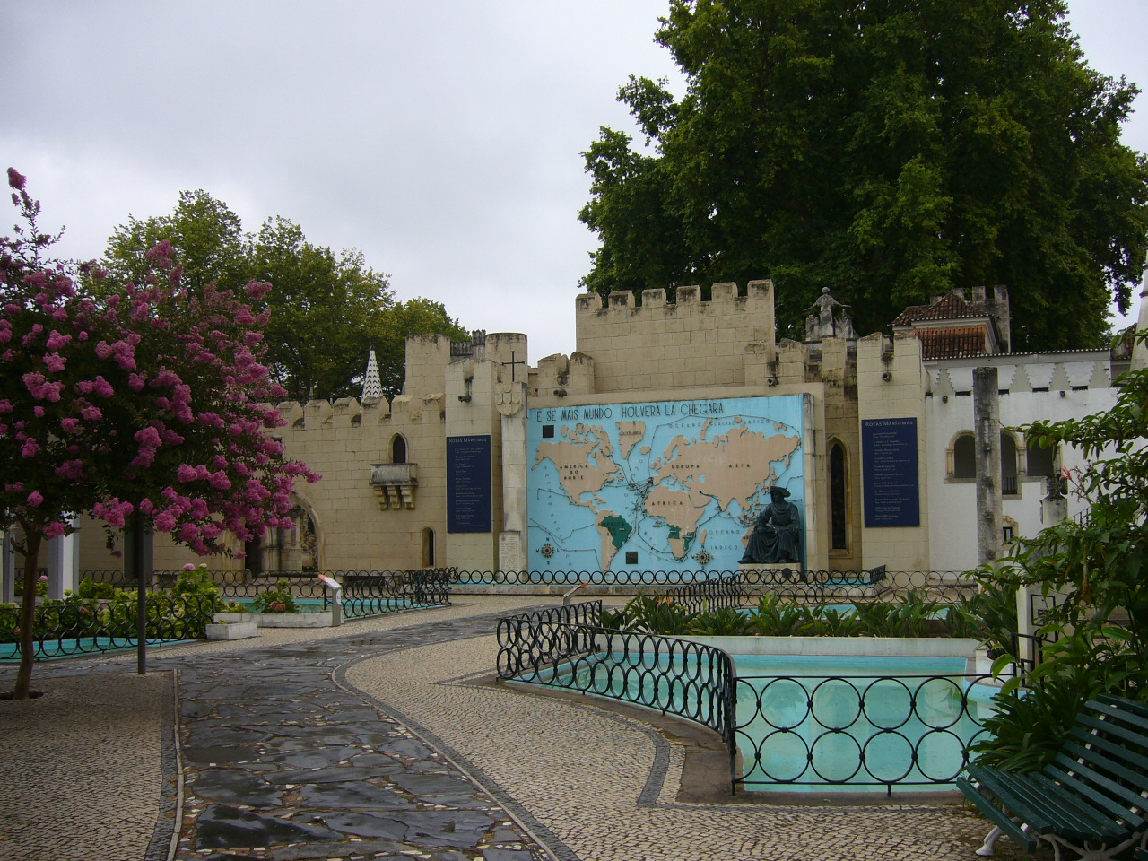 Portugal dos pequeniños, Coímbra, Agosto 2008